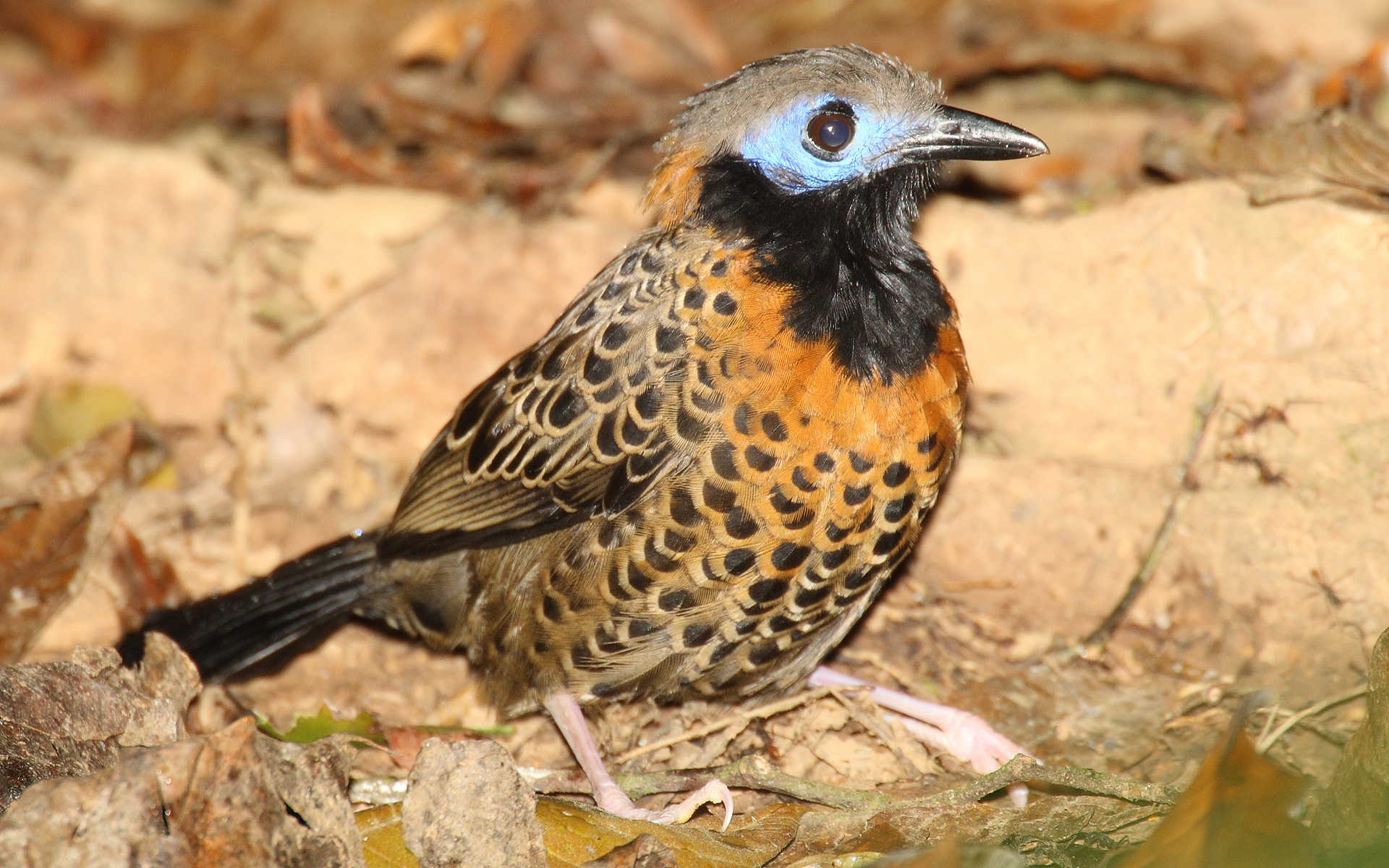 Ocellated Antbird -- Parque Nacional Darién, Panama -- 2008 February